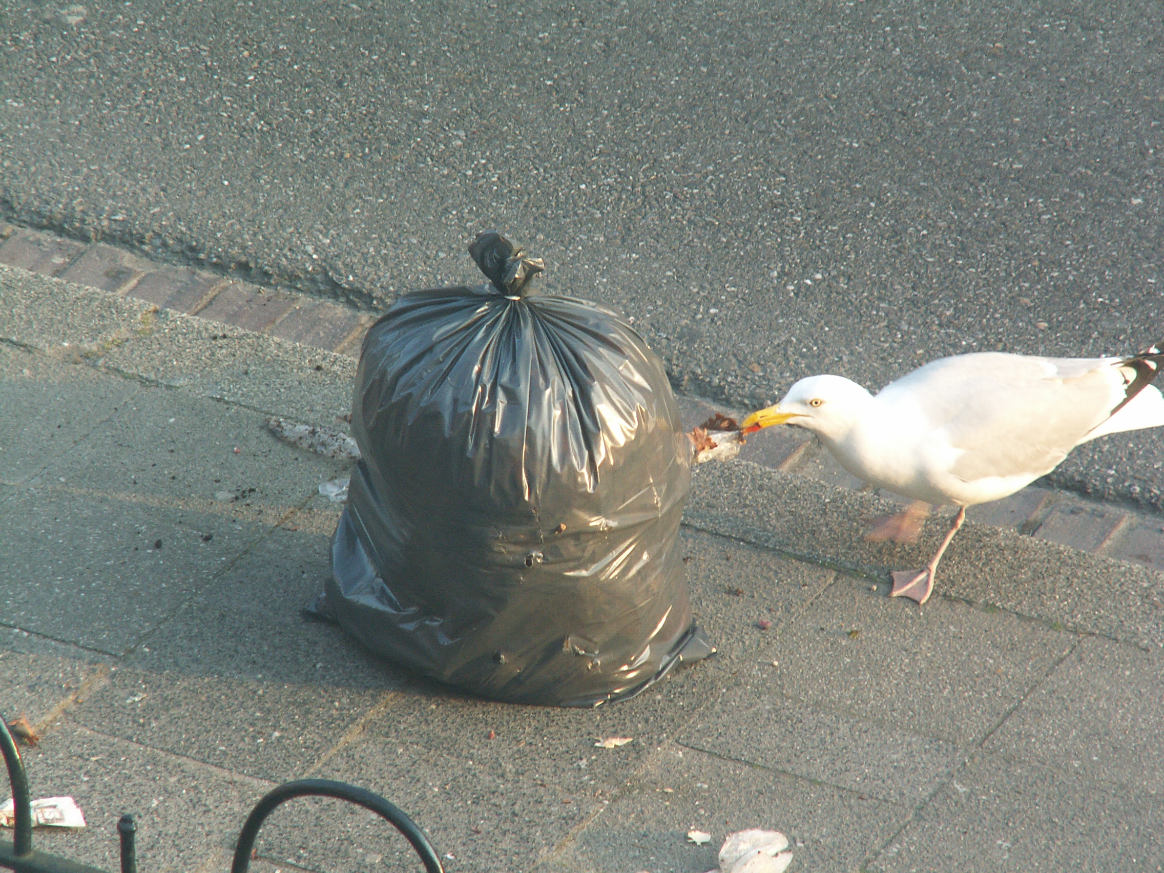 Larus argentatus